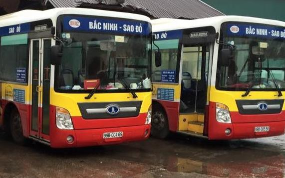 Một tuyến xe buýt ngoại tỉnh ở thị xã Chí Linh.